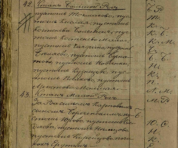 РГАДА, ф. 1209, оп. 73і, с.110. Поместный приказ. Вотчинная коллегия и Вотчинный департамент (объединение фондов). Историческая опись. Реестр списка с писцовых Владимирских книг князя Василия Кропоткина с 145 (1637) по 156 (1648) год. Книга 4.